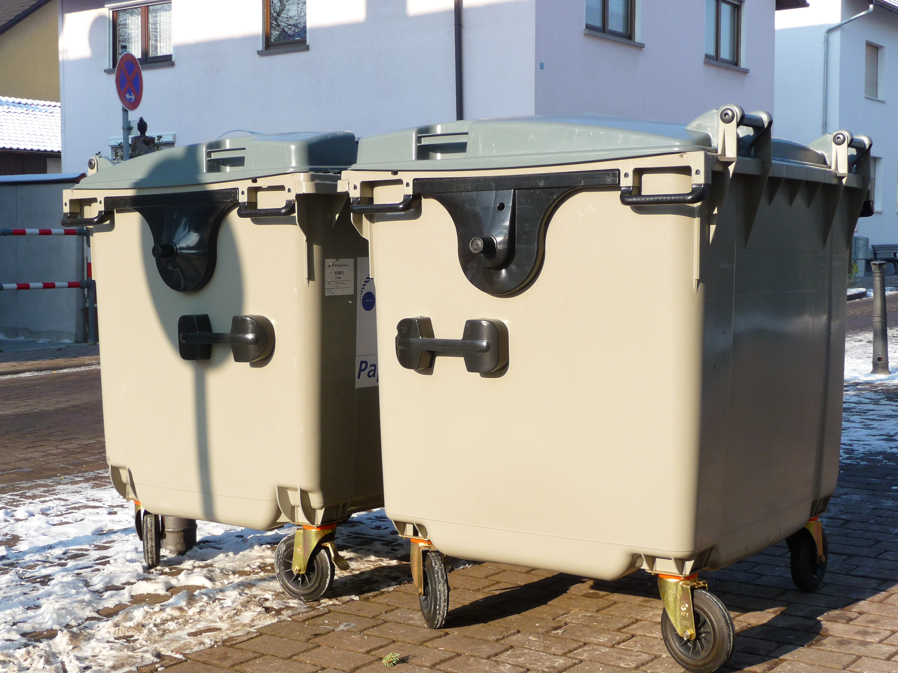 Restmüllgefäß, Vierradbehälter (Fassungsvermögen 1.100 l)